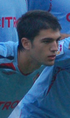 Antonio Rodríguez Dovale, no 2009 xogando co RC Celta de Vigo o trofeo Cidade de Pontevedra.